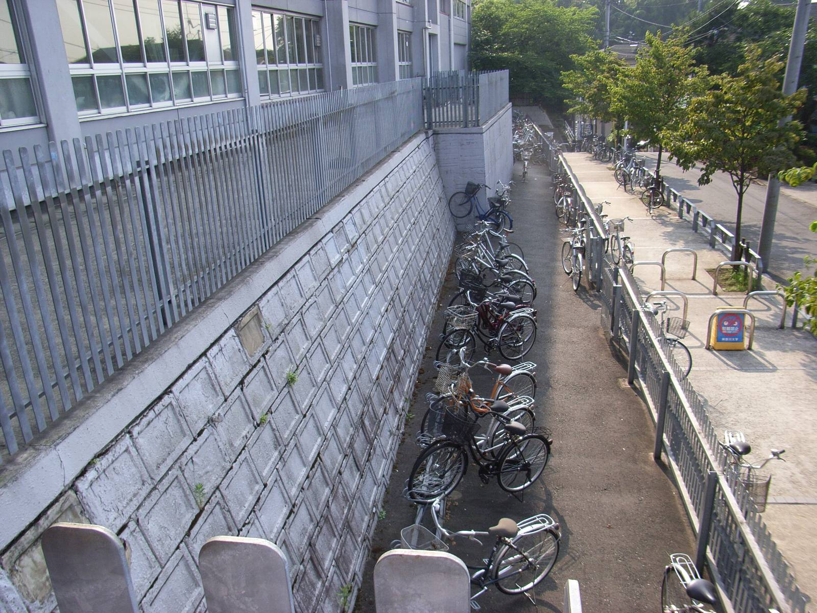 '70～'80年代のサークル長屋は駐輪場に…